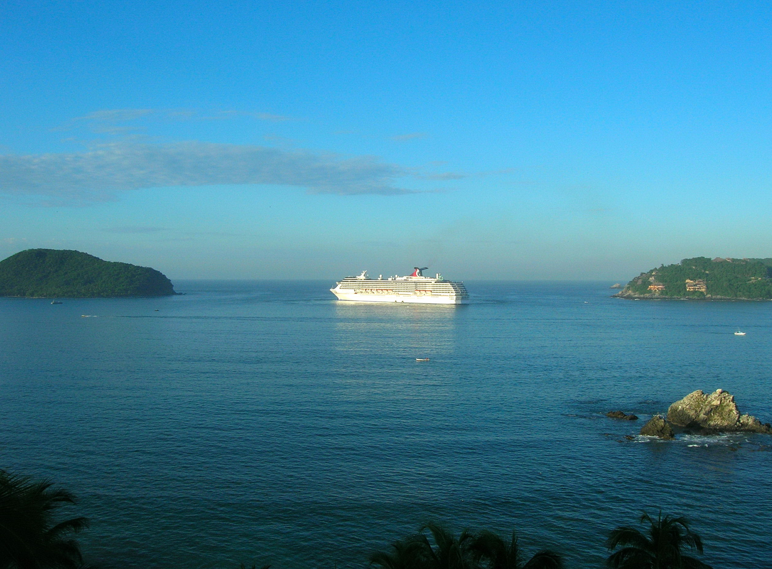 Zihuatanejo bay